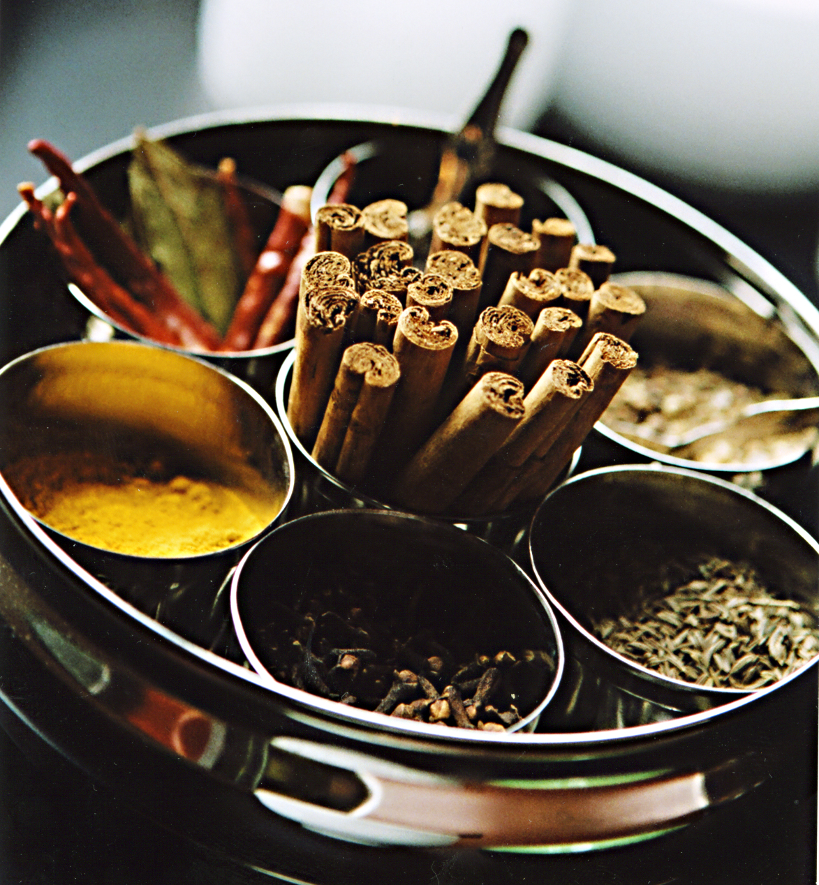 Chai-Kwon-Do